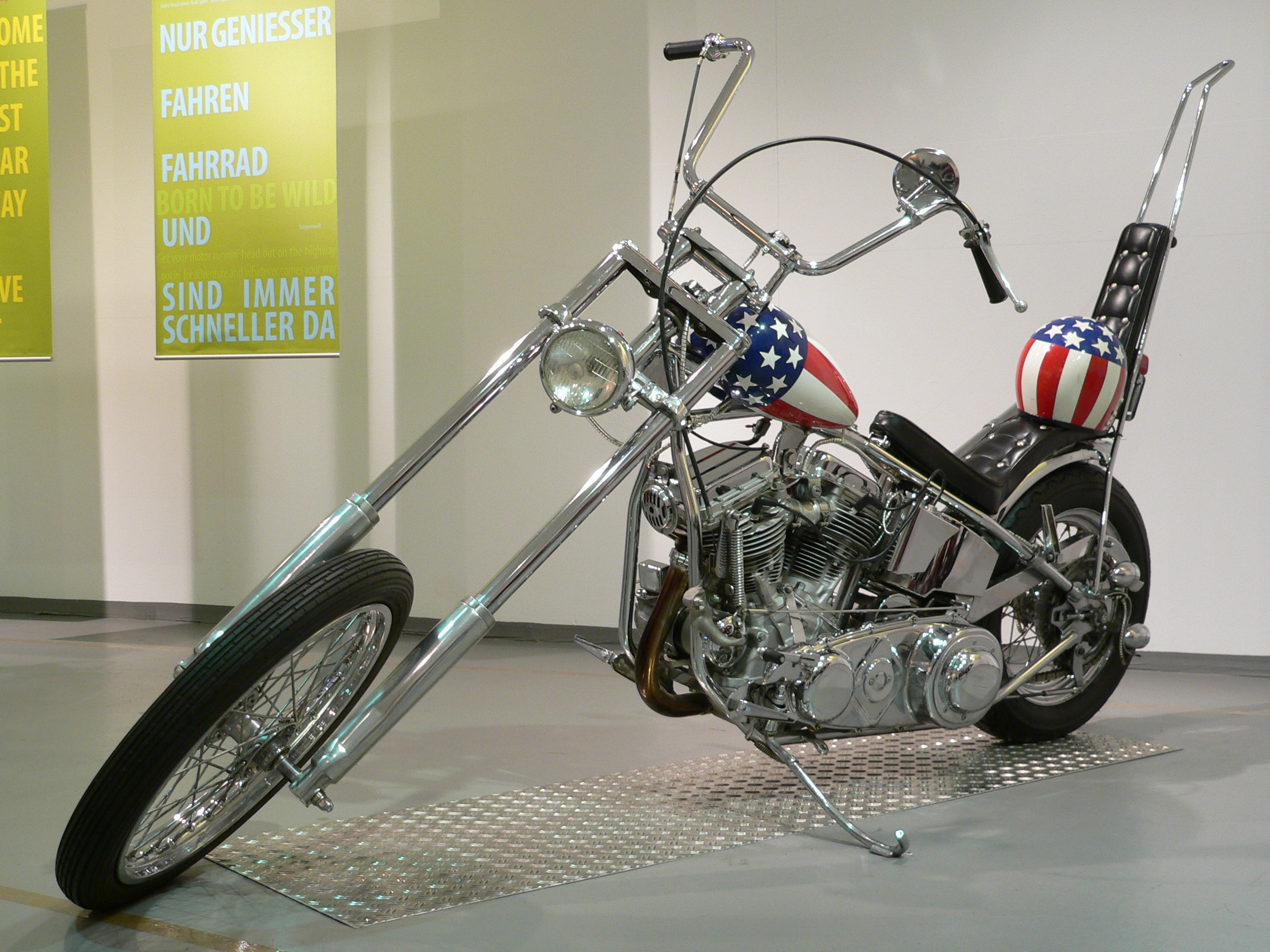 Motorbike "Easy-Rider-Chopper" Harley Davidson (1987) (Another View) at the Deutsches Zweirad- und NSU-Museum (50 PS)